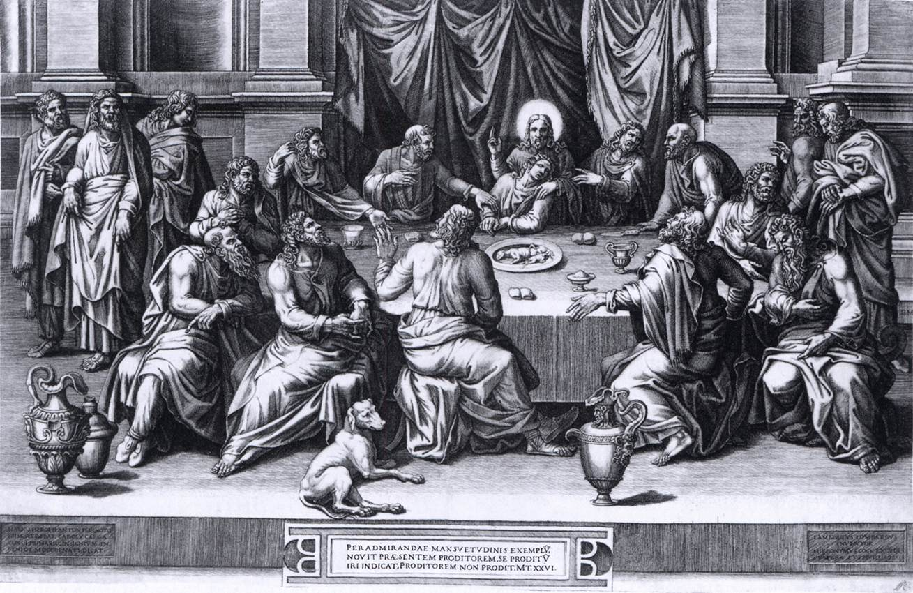 Giorgio Ghisi 1551 Engraving, 349 x 533 mm Last Supper, Metropolitan Museum of Art, New York